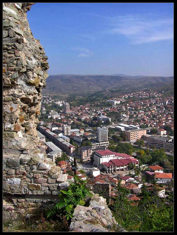 Pogled na center iz štipskega gradu Isar, poletje 2005